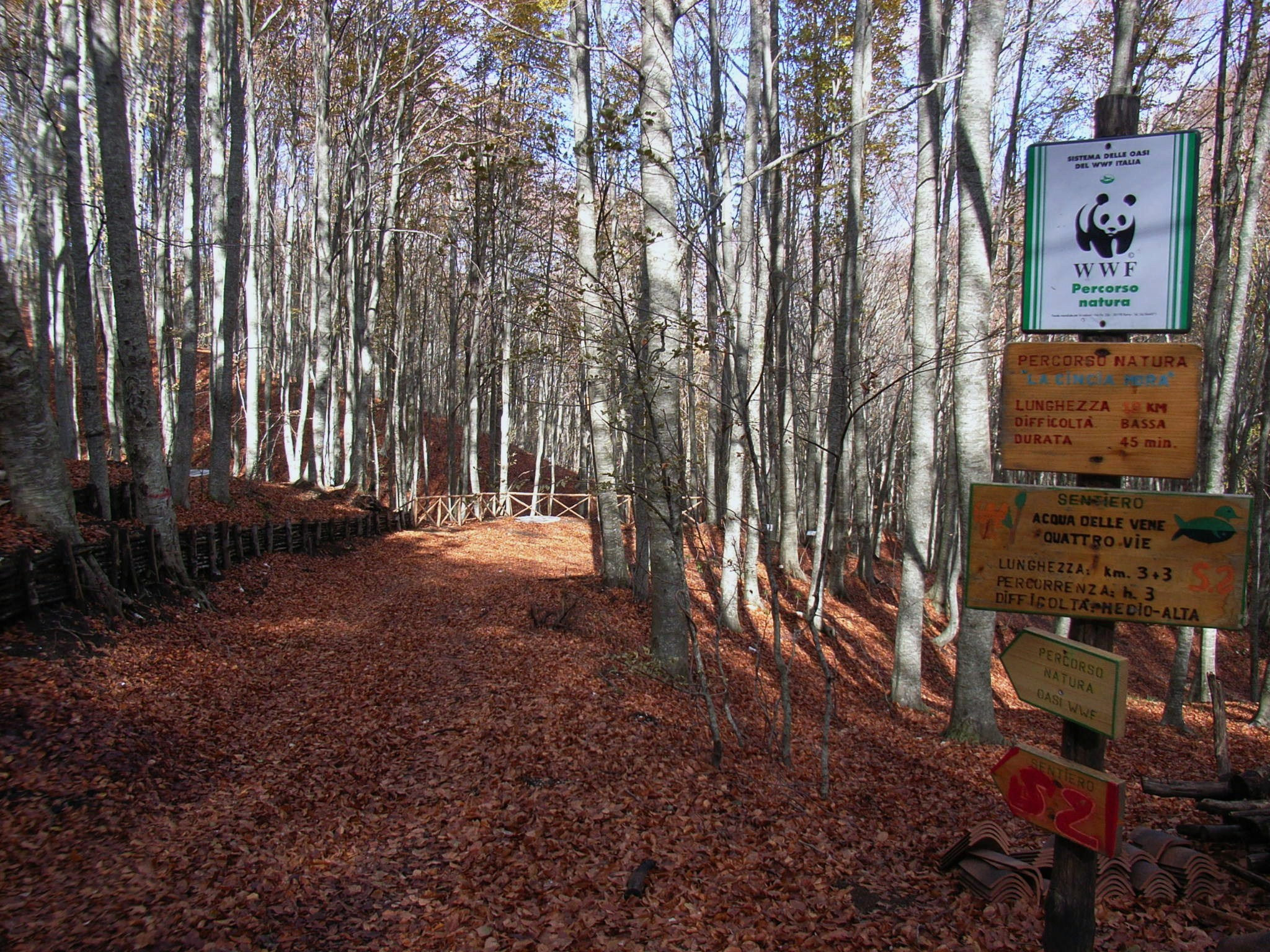 Montagna di Sopra This is a photo of a monument which is part of cultural heritage of Italy. The authorisation for taking photos of this object was provided by the World Wide Fund for Nature Italy.